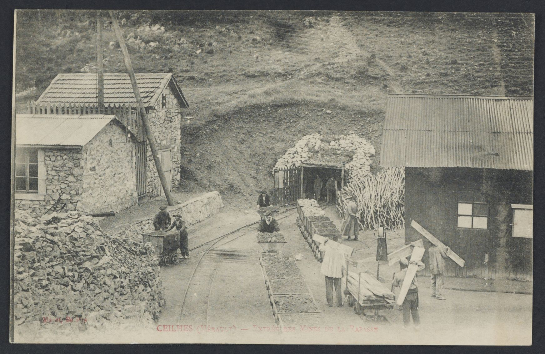 Ceilhes. - Entrée des mines de la Rabasse : carte postale.